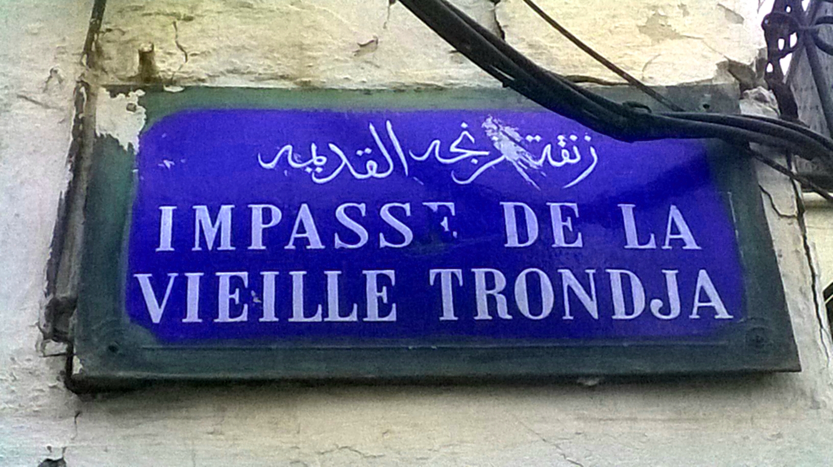 Quartier Tronja, Bab Souika , Tunis الترنجة، باب سويقة ، تونس العاصمة